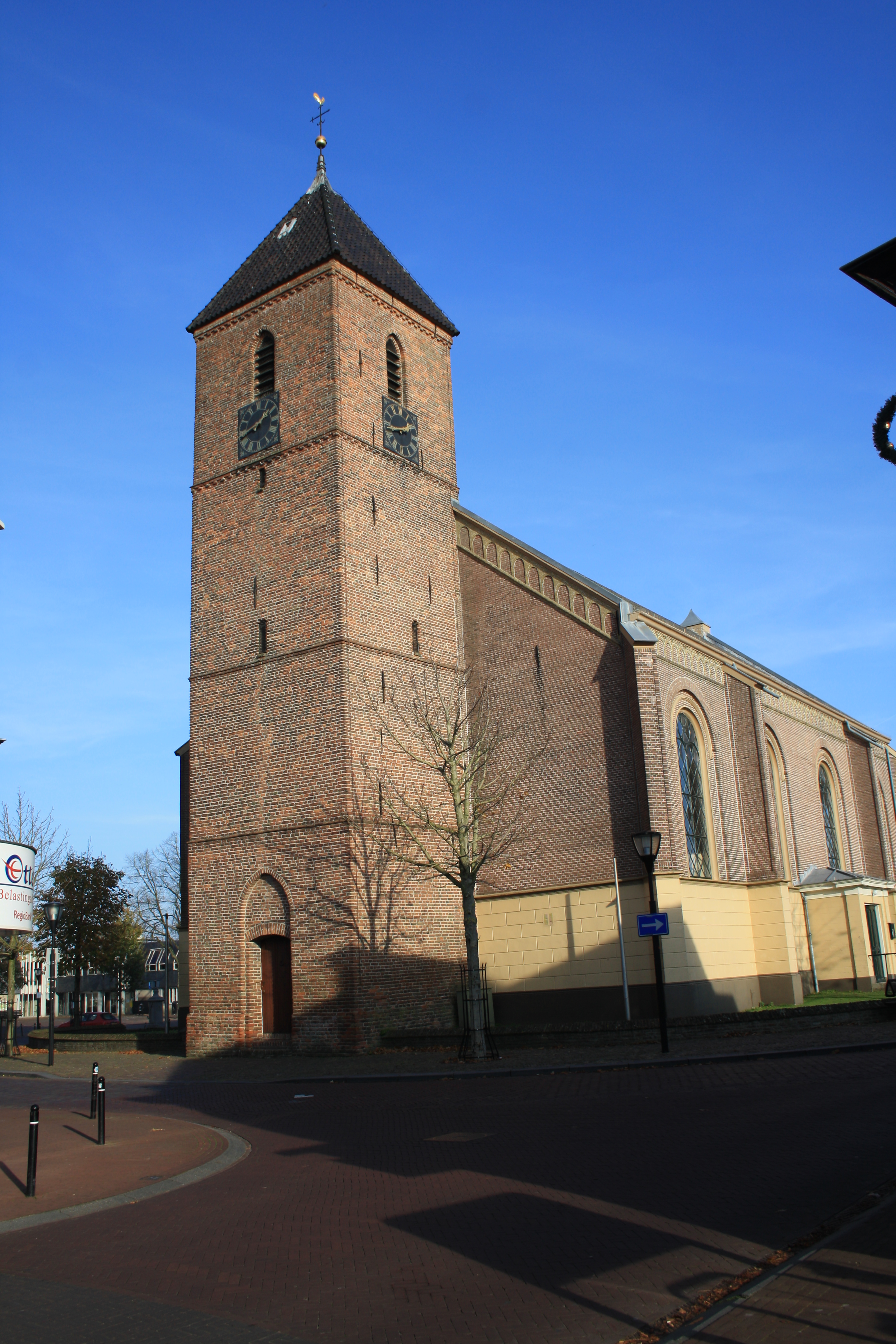 Heino - Nicolaaskerk uit 1867